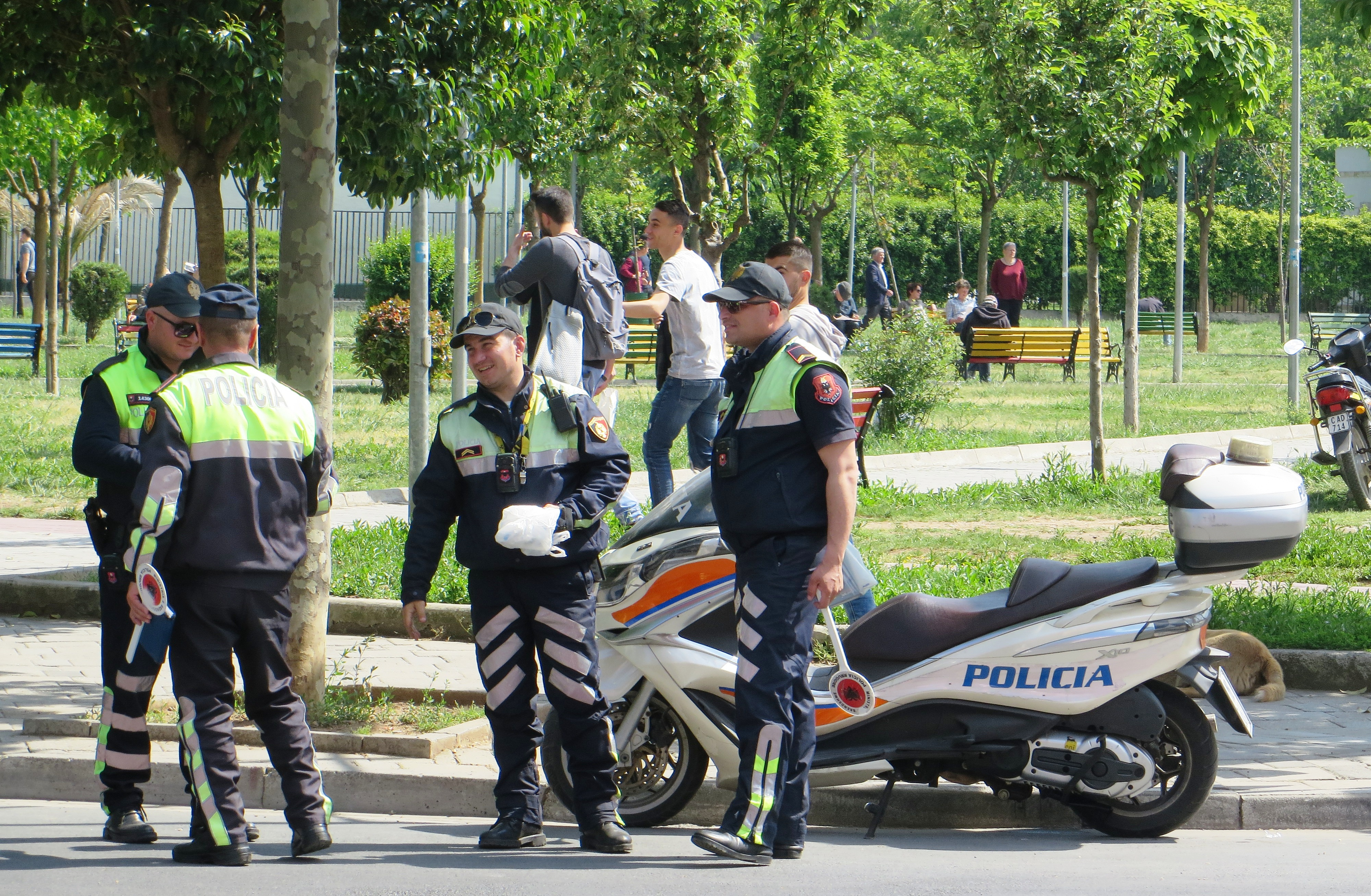 Politie motoren in Albanië